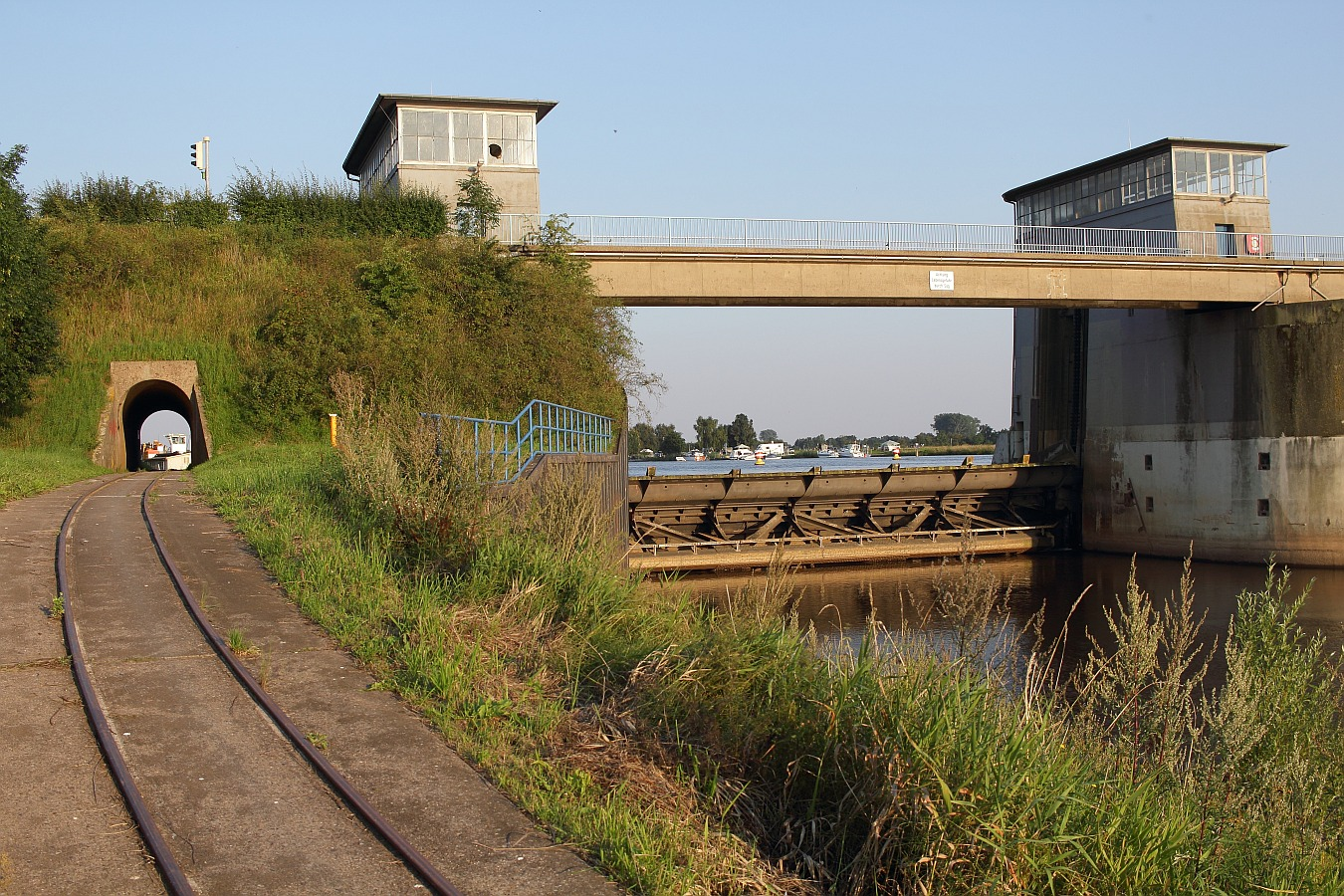 Staustufe Langwedel (Mittelweser) mit Brücke für den Kraftfahrzeugverkehr. Blick vom Unterwasser.